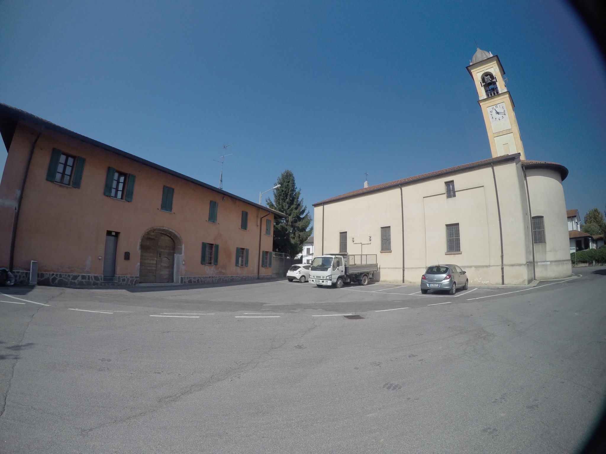 GAGGIANO - CHIESA DI SANT’ANDREA APOSTOLO - BARATE